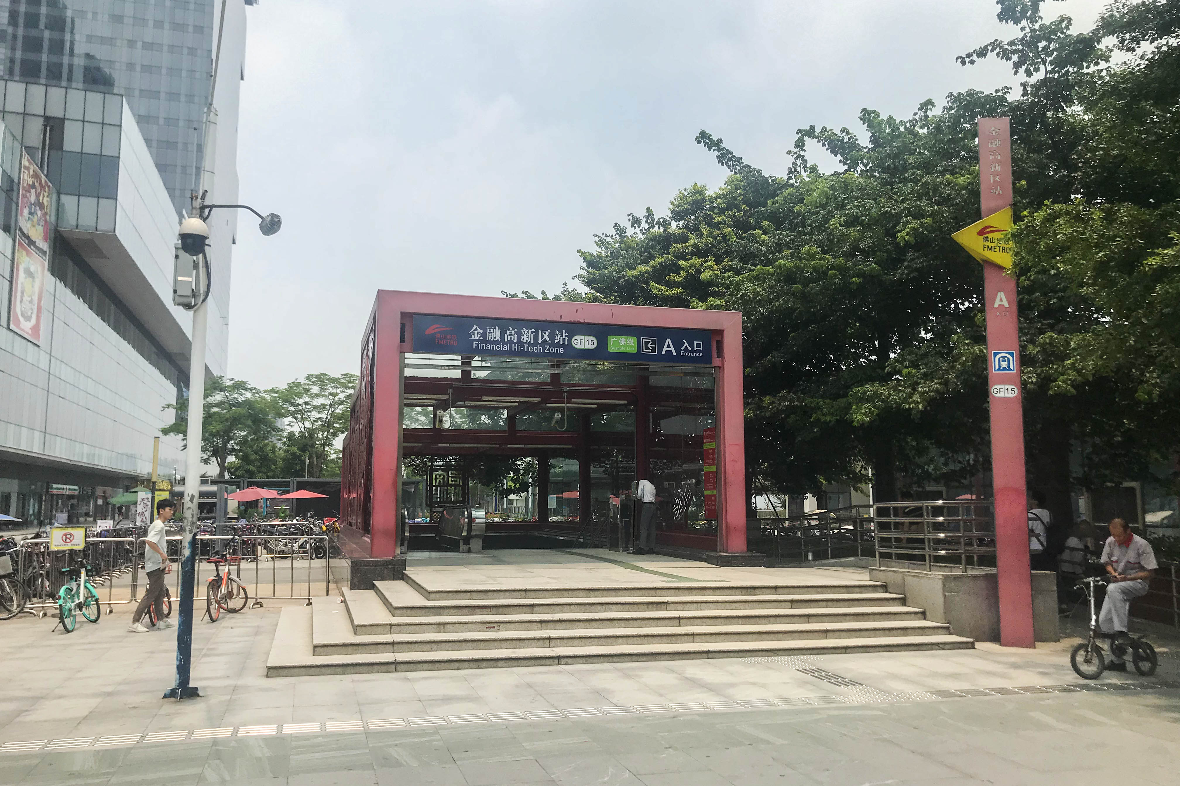 广佛地铁金融高新区站